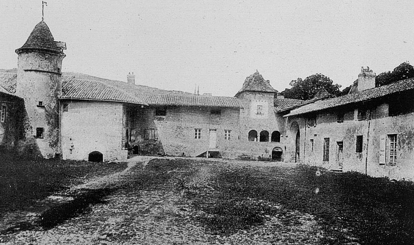 Dictionnaire illustré des communes du département du Rhône. Tome 1 / par MM. E. de Rolland et D. Clouzet.